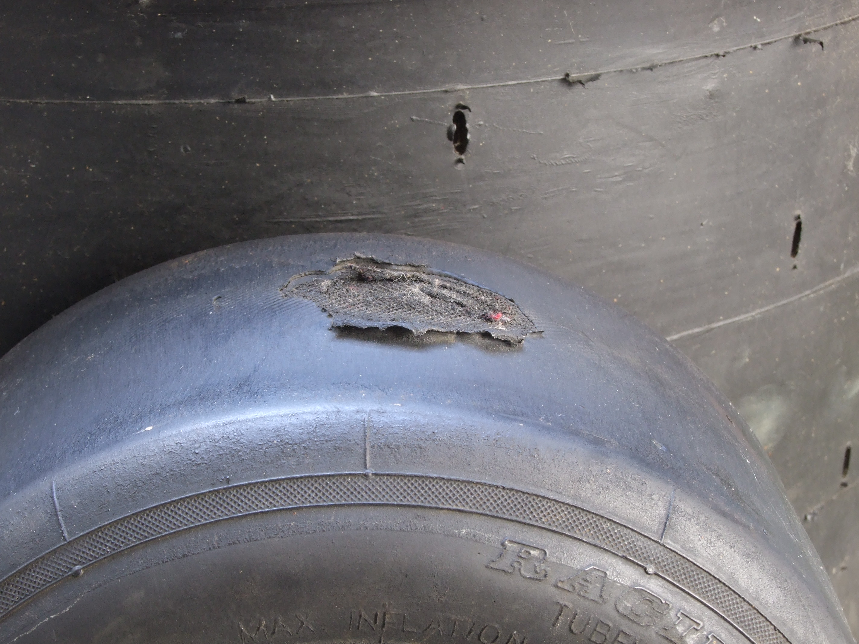 Bremsplatten am Kart-Vorderreifen